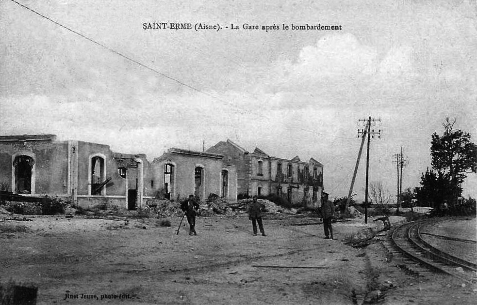 La gare détruite après un bombardement durant la première guerre mondiale.